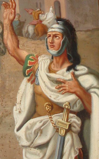 Longin - legionista rzymski, fragment stacji XII drogi krzyżowej w kościele pw. śś. Piotra i Pawła w Kamiennej Górze.